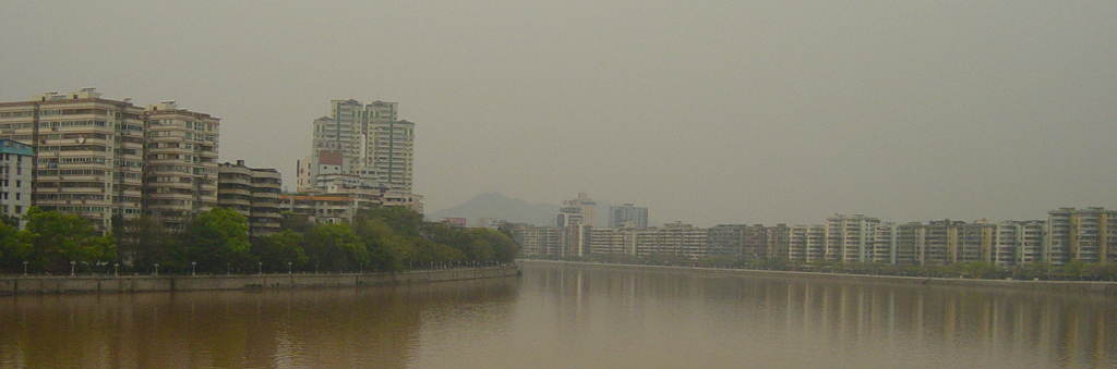 韶关市区一景 创作方法:自拍 拍摄人:zhuwq 拍摄时间:2005年4月3日